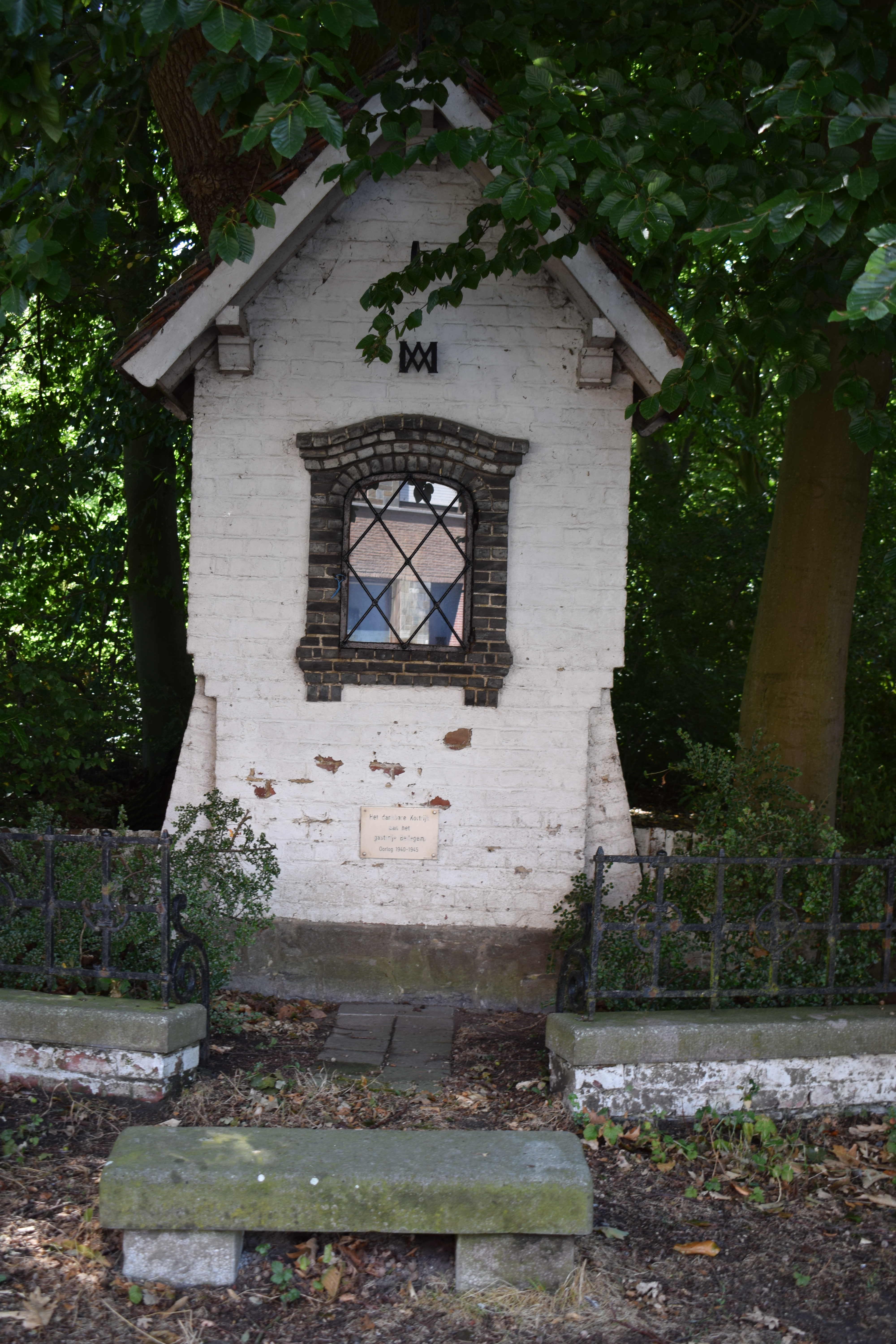 Groeningekapel in de Walleweg in Bellegem.